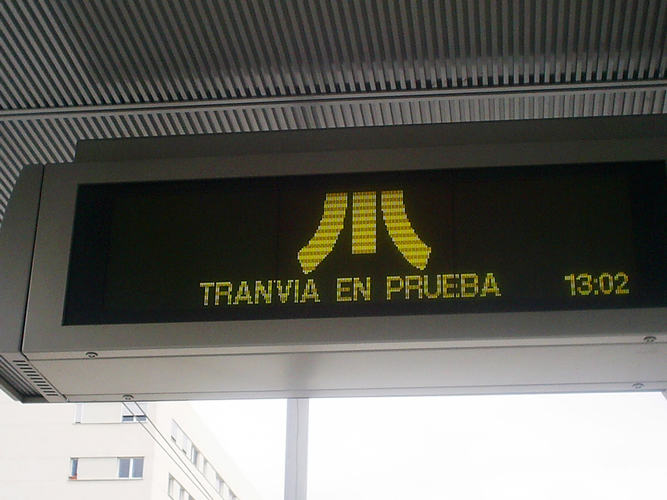 Panel del tranvía de Tenerife cuando estaba en fase de pruebas.